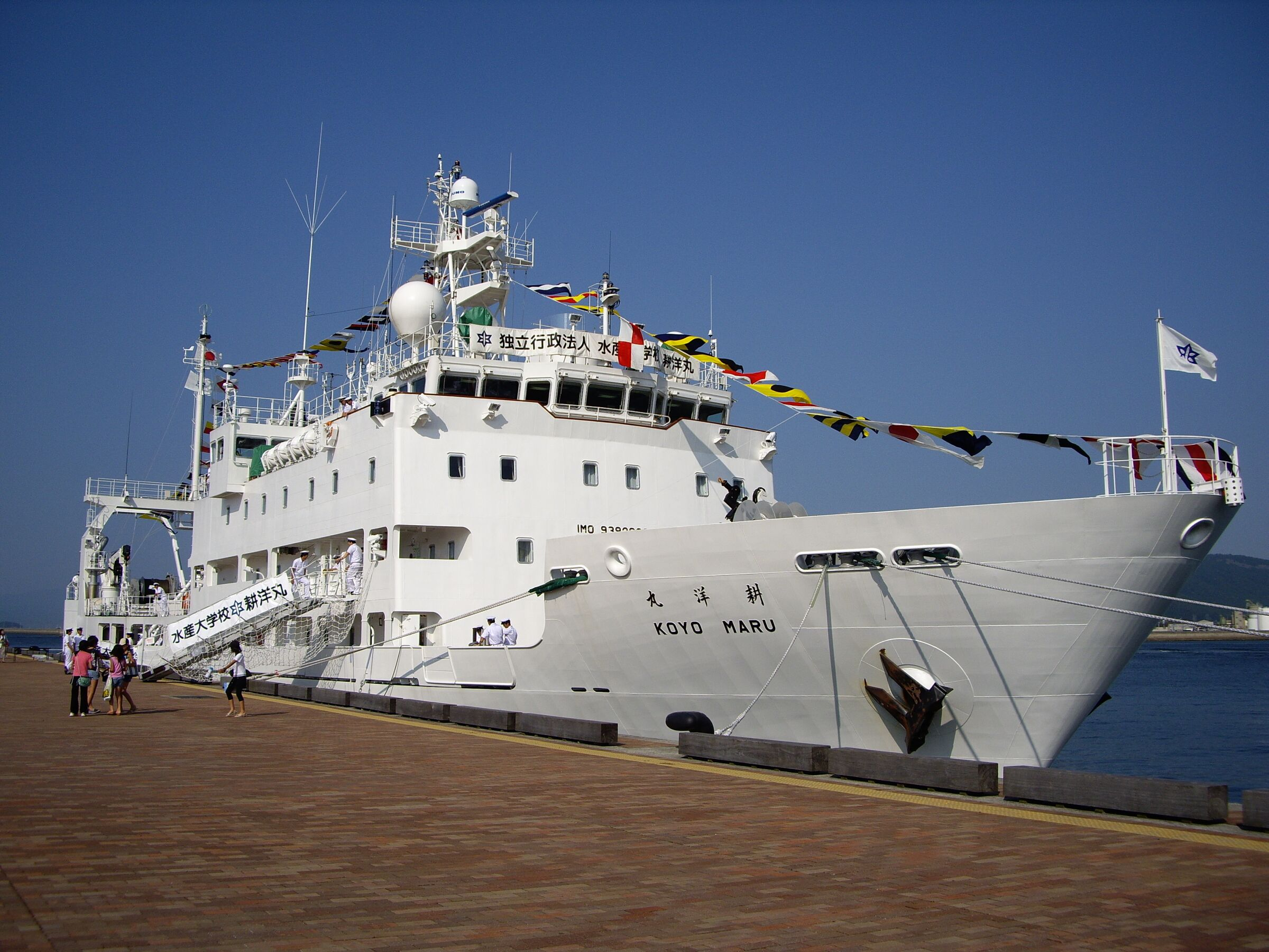 耕洋丸（水産大学校の航海練習船 ）： 日本国香川県高松市のサンポート高松にて撮影